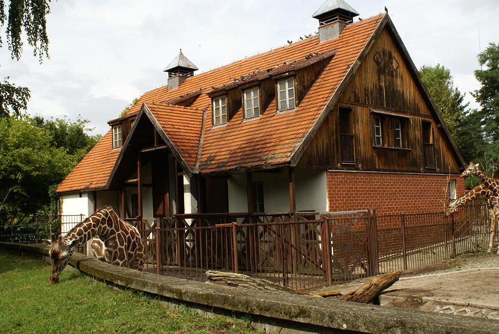 Wrocław Śródmieście, ul. Wróblewskiego 1 - Ogród Zoologiczny: żyrafiarnia (zabytek nr A/5263/361/Wm)